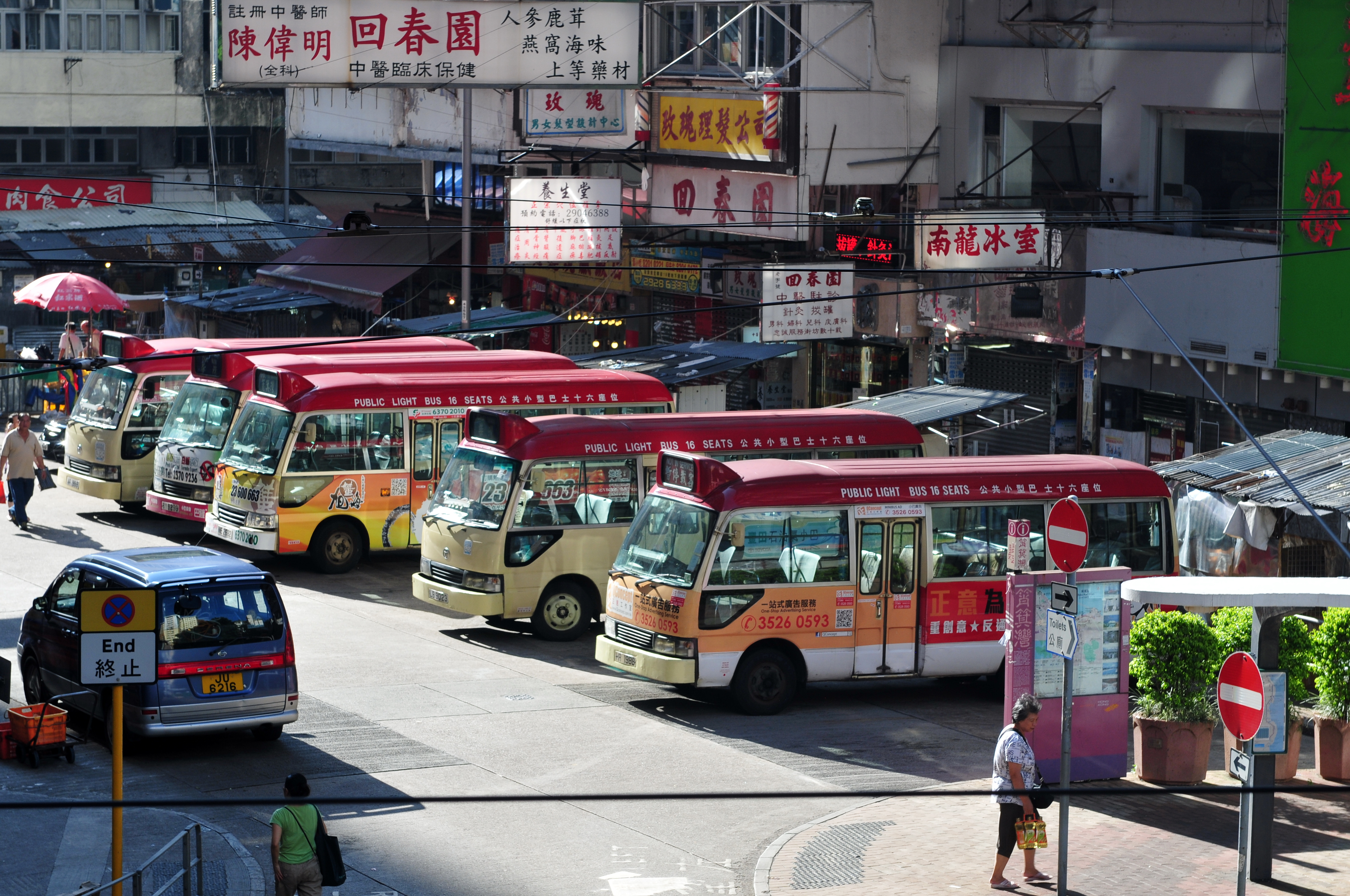 Wikimania 2013 Hongkong